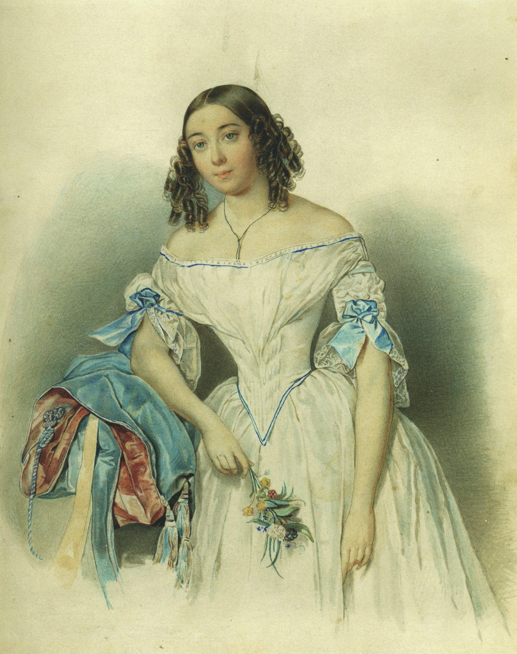 Эмилия Карловна Мусина-Пушкина (1810—1846)